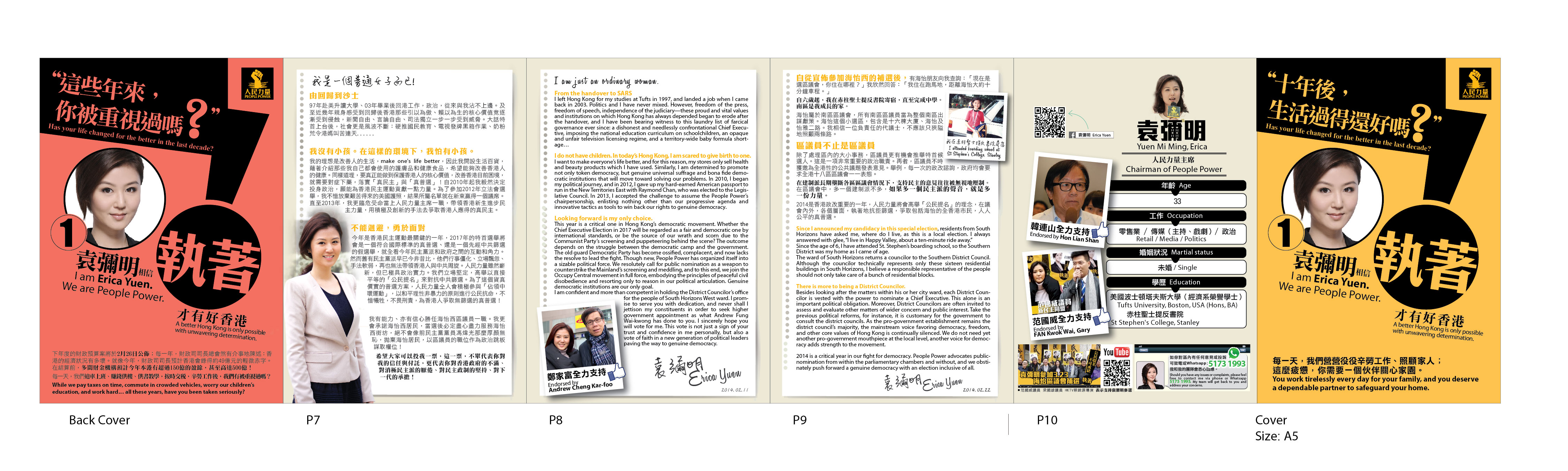 人民力量主席袁彌明參選海怡西補選的宣傳單張，第二款，正面。強調政治訴求：「公民提名，不可或缺」。